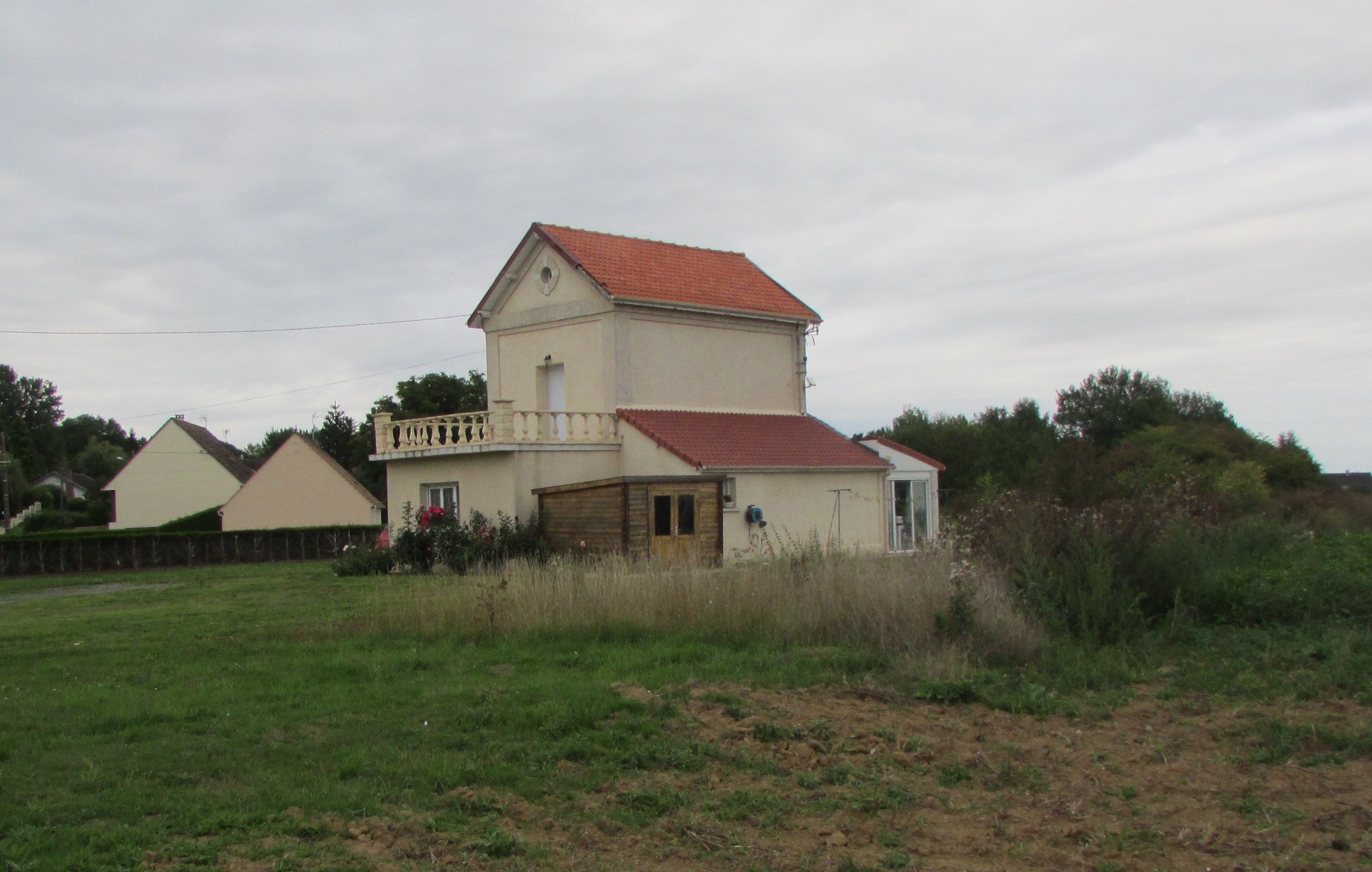 Gare Holnon-Savy